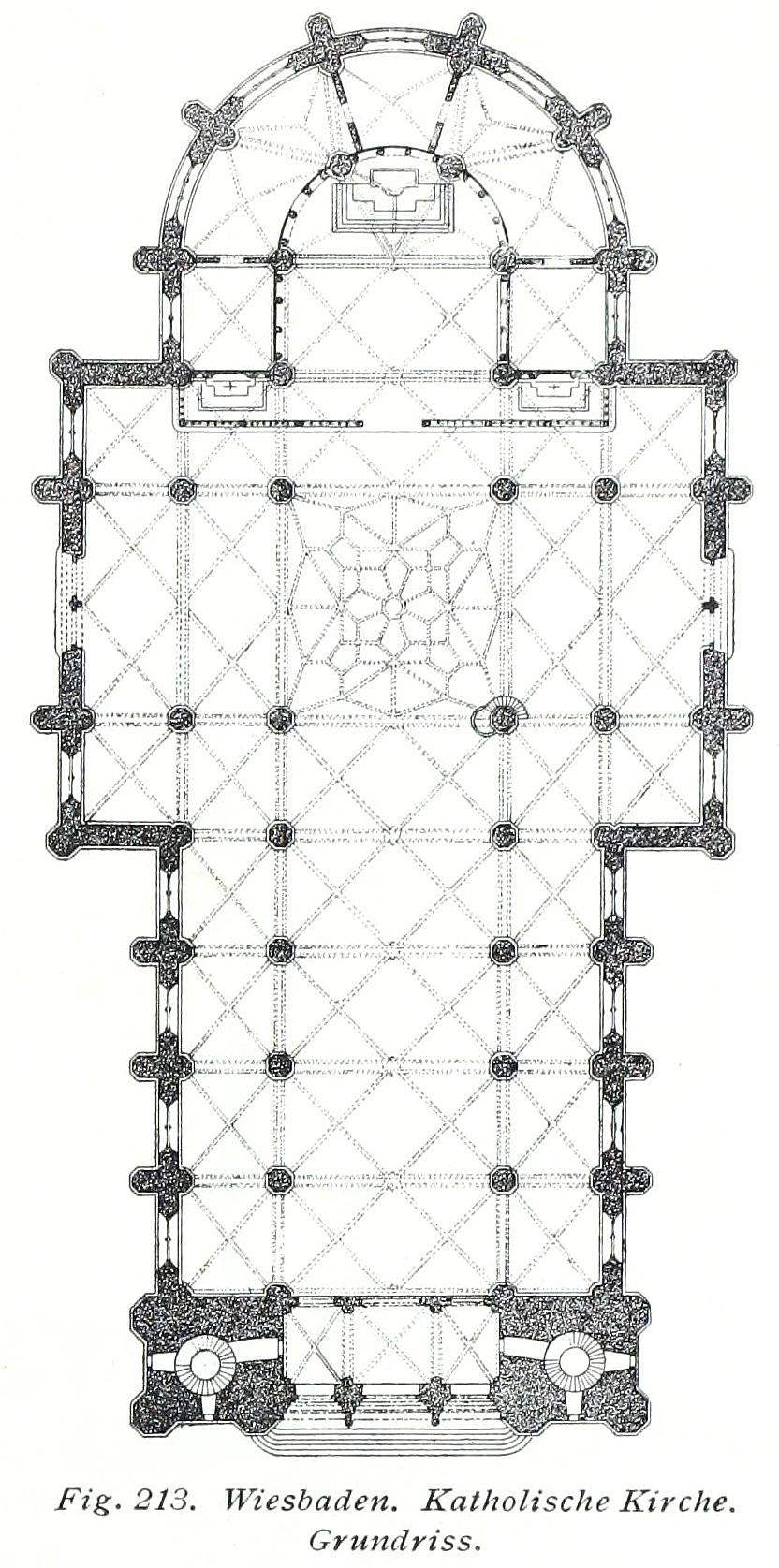 Wiesbaden katholische Kirche Grundriss